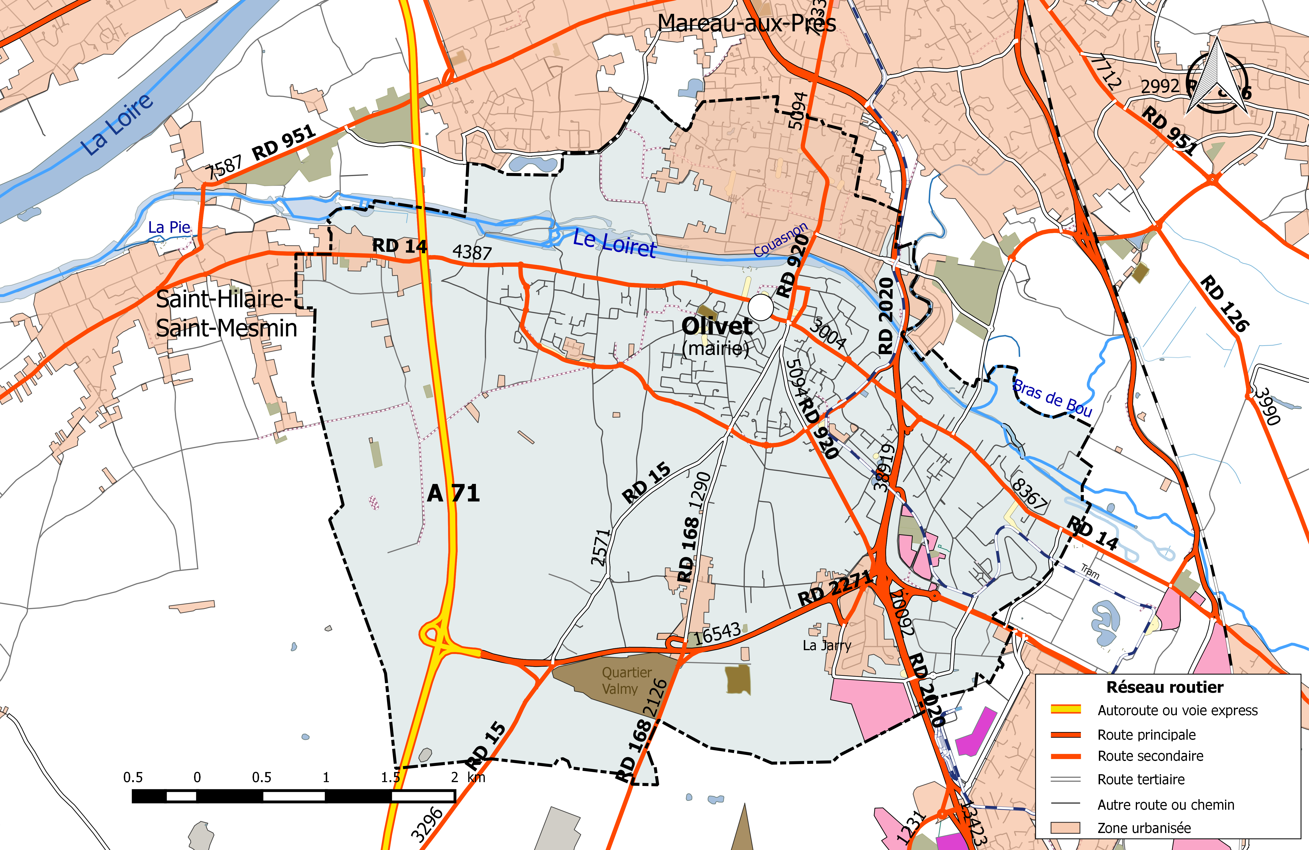 Carte du réseau routier de la commune de Olivet (Loiret).